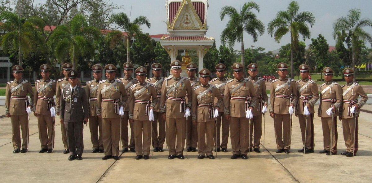 นายตำรวจปกครองของโรงเรียนนายร้อยตำรวจ(RPCA Commander) ในเครื่องแบบครึ่งยศ และเครื่องแบบปกติเสื้อนอกคอแบะสีกากี ในวันพิธีถวายสัตย์ปฏิญาณตนและสวนสนามวันตำรวจ 13 ตุลาคม)